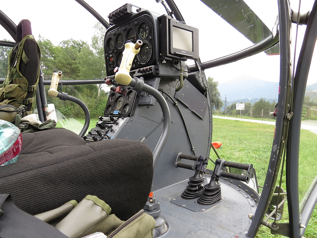 Aérospatiale SA-319 Alouette III Cockpit